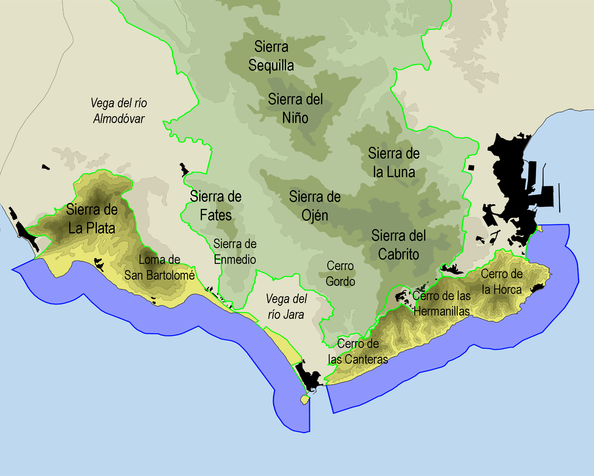 Mapa topográfico del Parque natural del Estrecho.